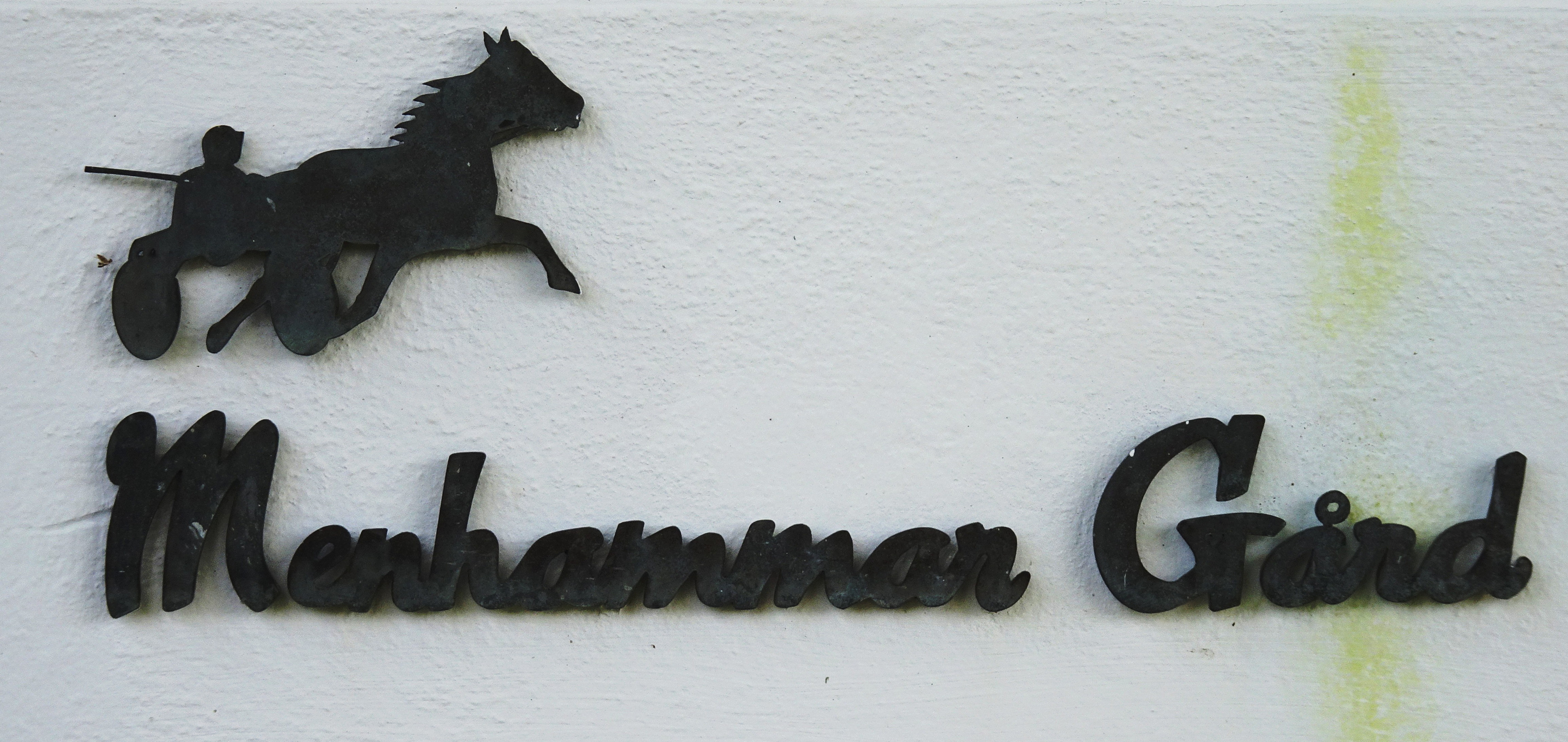 Menhammar stuteri